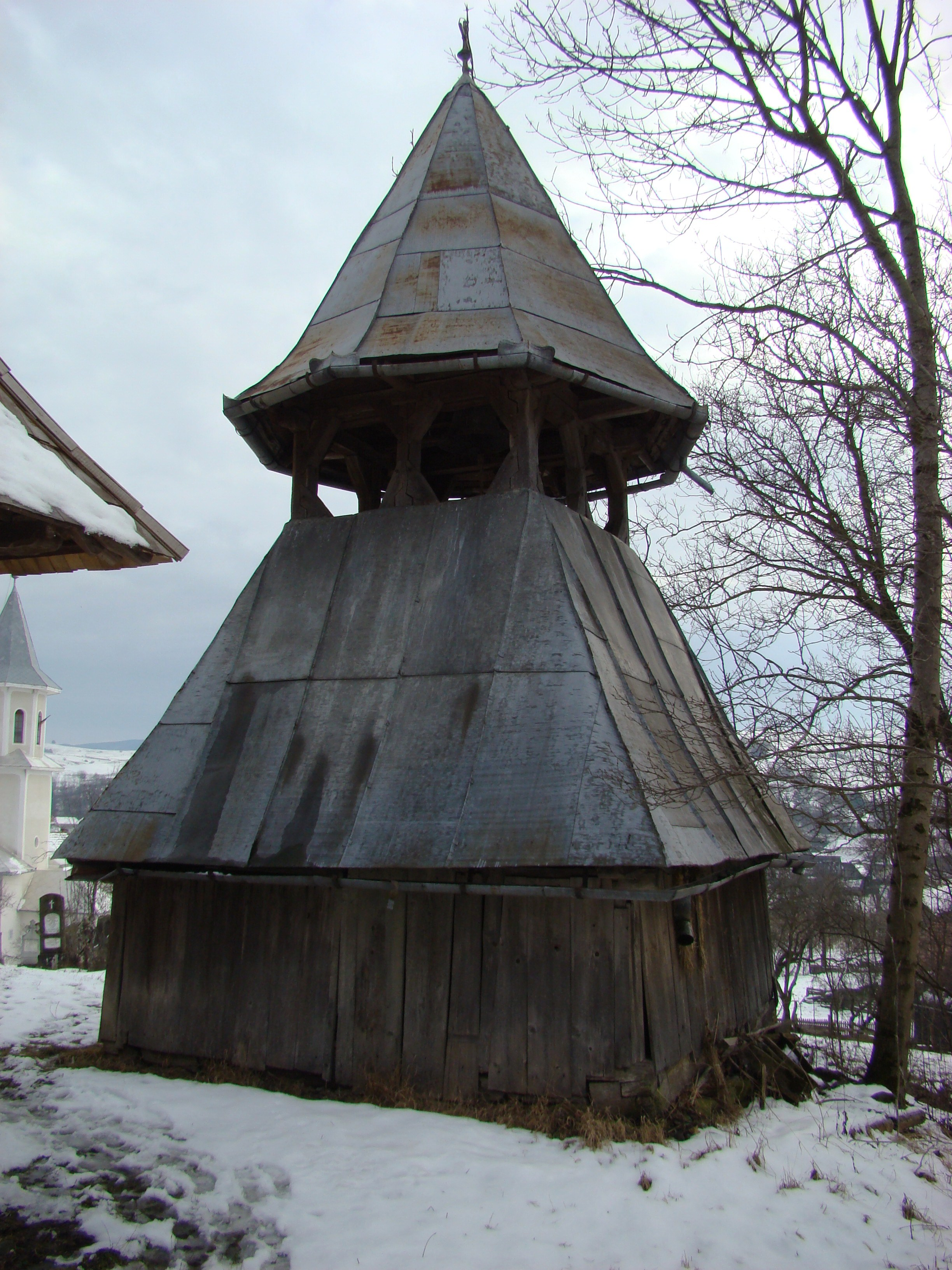 Urișiu de Jos, Mureș